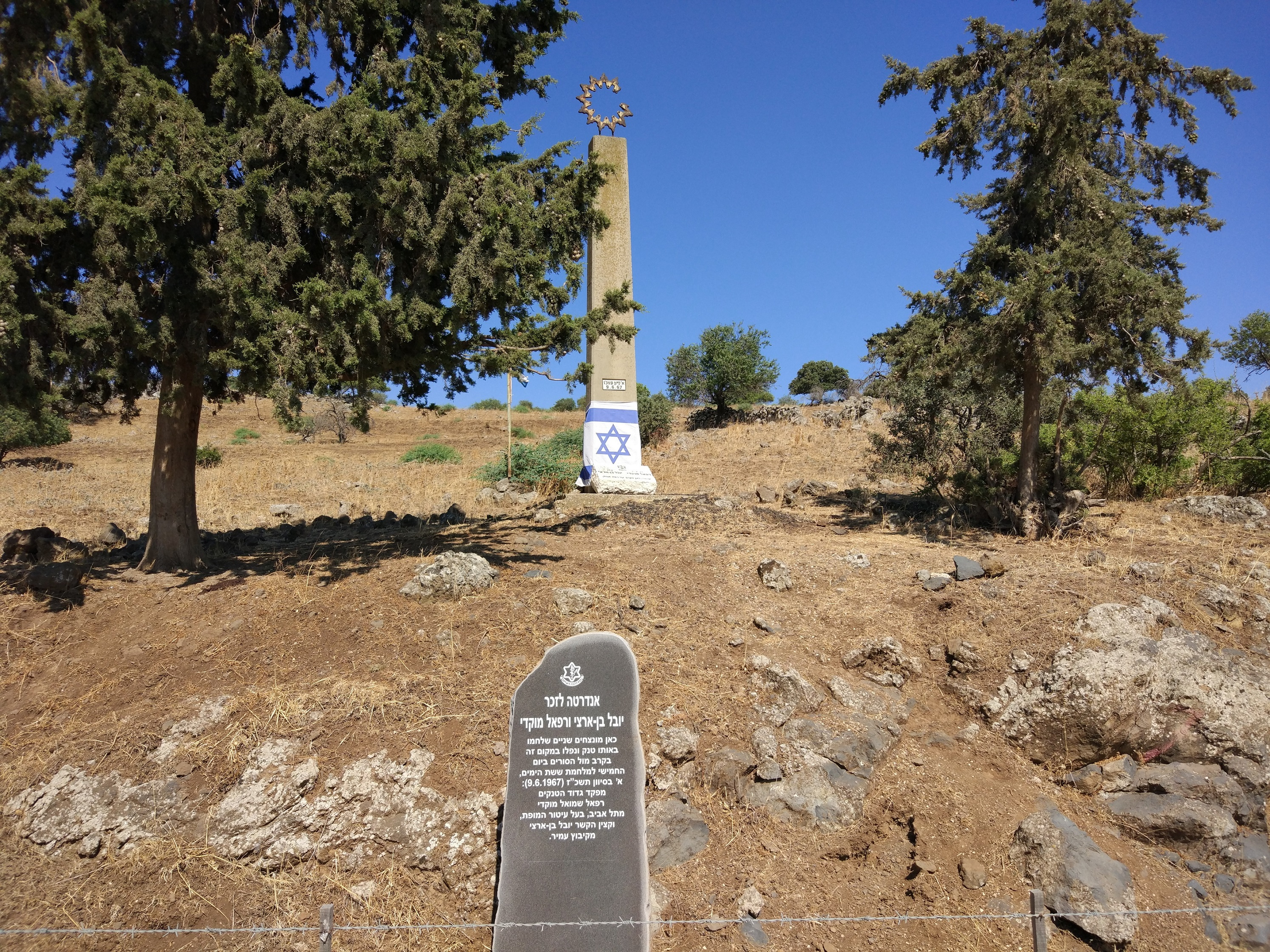 אנדרטה לזכר רפי מוקדי ויובל בן ארצי מחטיבה 8. על ציר הנפט בסמוך לכפר הסורי הנטוש סיר א-דיב. יולי 2017